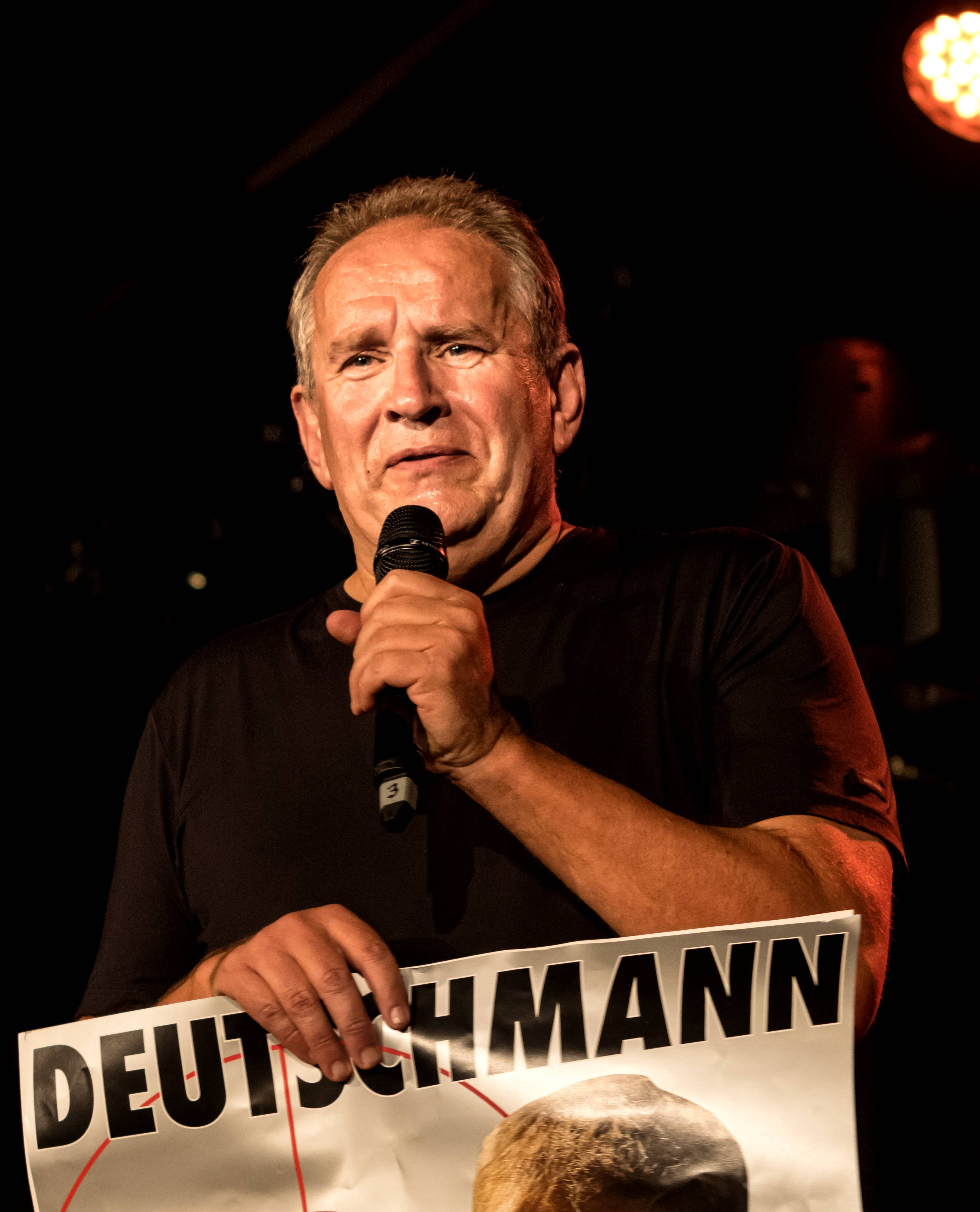 Bilder vom ZMF 2015 Mariza